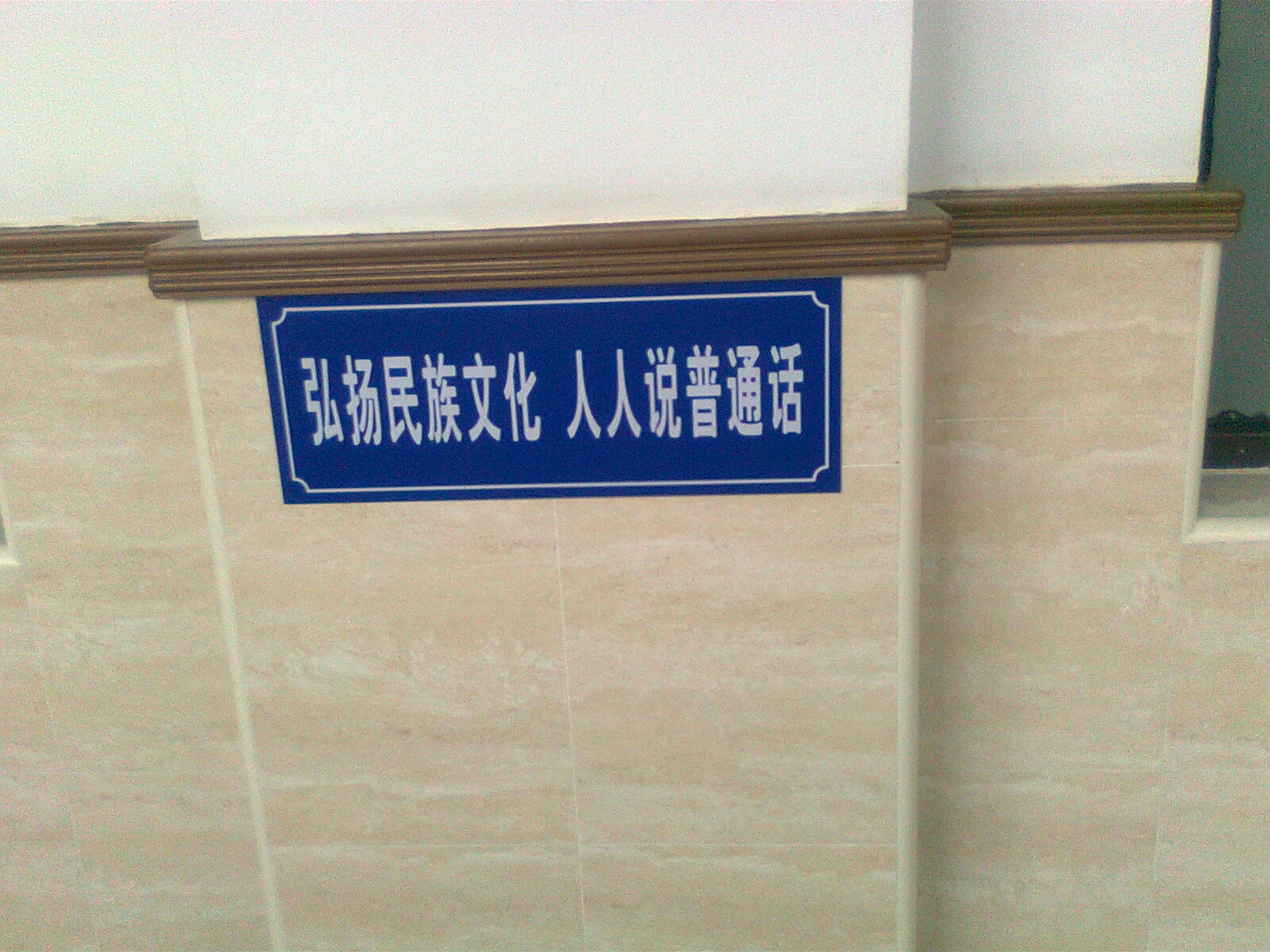 中学校园中贴满了类似推广普通话的标签。使用Nokia 2710 classic摄于上海市田家炳中学